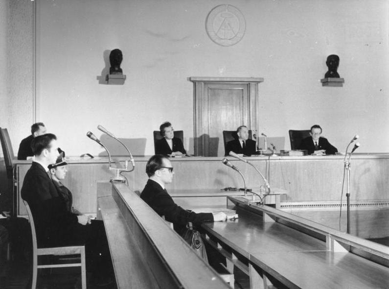 Zentralbild/Hesse 27.12.1962 Prozeß gegen Westberliner Terroristen vor dem Obersten Gericht der DDR Vor dem ersten Strafsenat des Obersten Gerichts der DDR begann am Vormittag des 27. Dezember 1962 ein Prozeß gegen das leitende Mitglied einer Westberliner Terrororganisation, den 24jährigen Harry Seidel, der an planmäßig organisierten Provokationen gegen die DDR-Staatsgrenze teilgenommen und gegen das Gesetz zum Schutze des Friedens verstossen hat. UBz: Übersicht am 1. Prozeßtag. den Vorsitz führt der Präsident des Obersten Gerichts Dr. Heinrich Toeplitz (Mitte). Links der Angeklagte, davor sein Wahlverteidiger, Rechtsanwalt Klose.